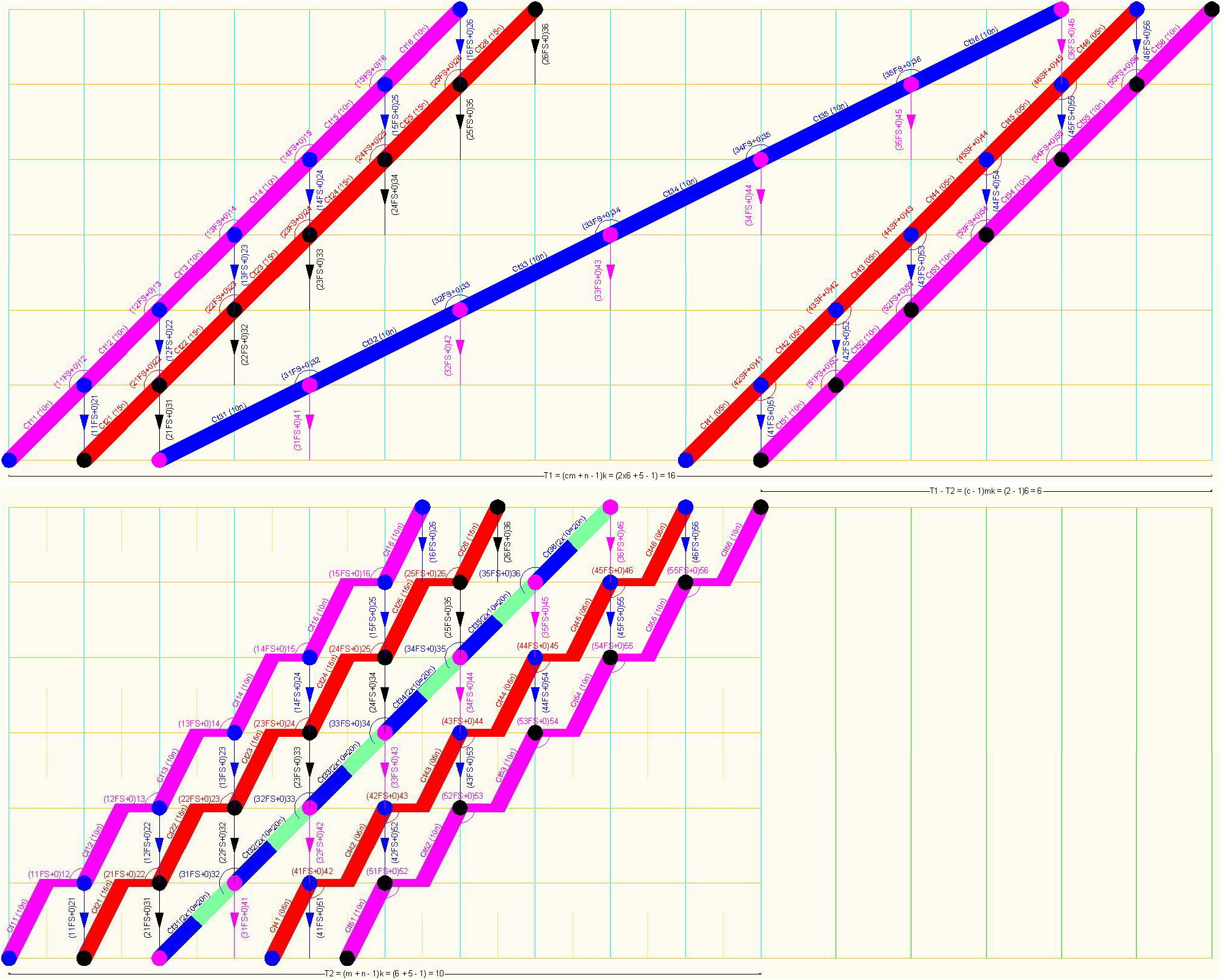 Hình vẽ mô tả việc biến đổi dây chuyền đơn nhịp bội số (còn gọi là cân bằng dây chuyền nhịp bội theo nhịp nhanh), trong tiến độ dây chuyền nhịp bội (nhịp nhanh), thành nhiều dây chuyền đơn cùng chuyên môn. Nhằm làm giảm tối đa thời lượng thực hiện toàn bộ dự án. Hình hoàn toàn do tôi sáng tạo ra, qua việc vẽ trên AutoCAD 2010, chụp ảnh màn hình, và sửa đổi trên ACD FotoCanvas 3.0 cùng Paint.